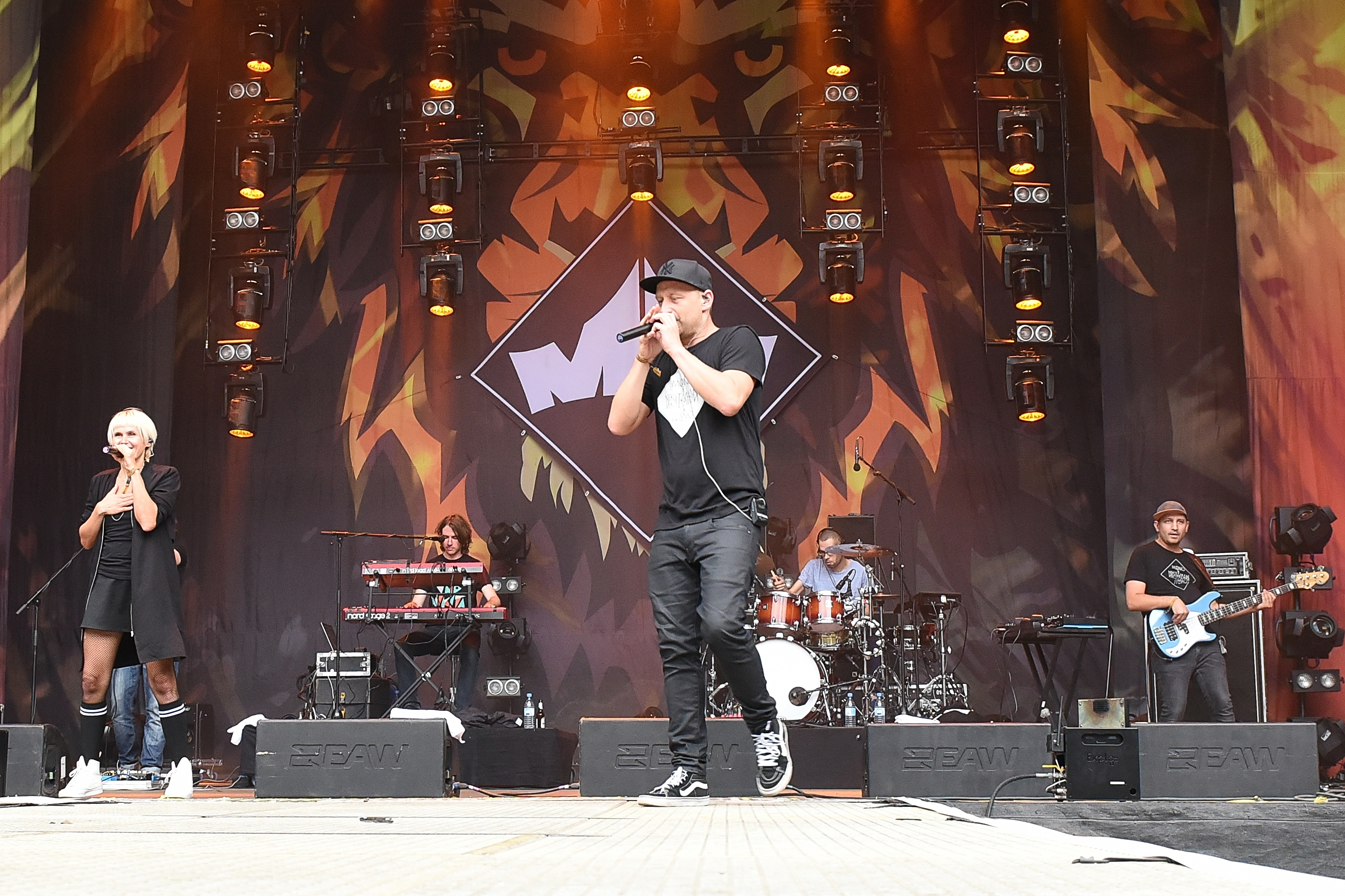 Mono & Nikitaman beim Ruhr Reggae Summer in Mülheim